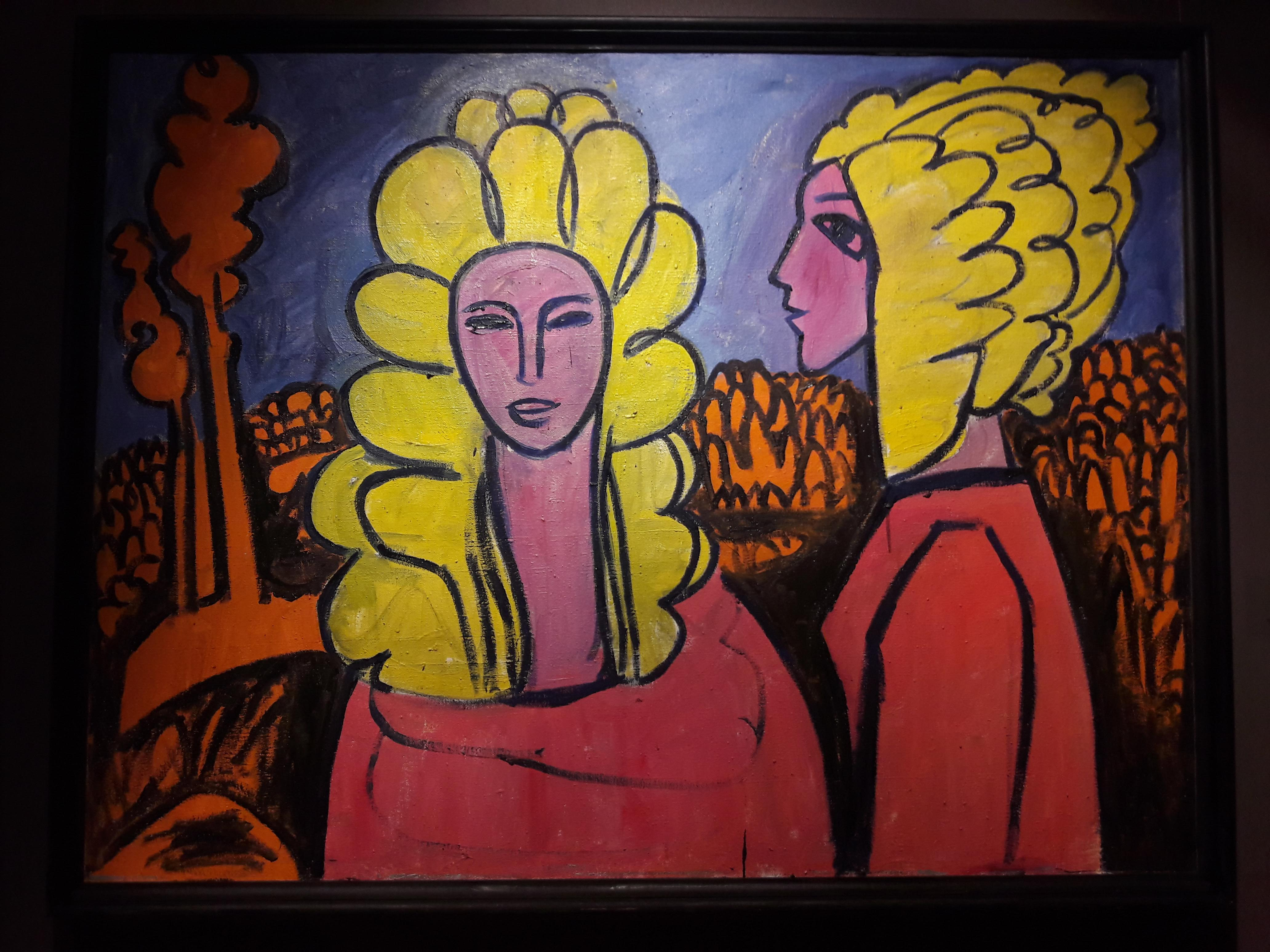 Зроблена ў жніўні 2018г. у Нац. мастацкім музэі Менска на персанальнай рэтраспектыве мастака.